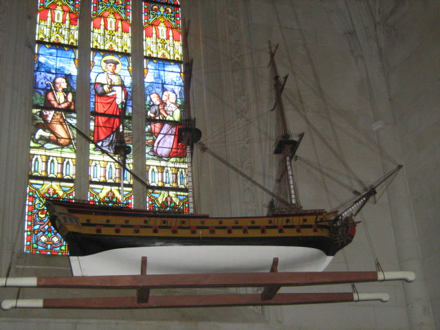 Maquette "Notre Damme Damour", ex-voto (1746). Chapelle Notre-Dame de Quelven, Guern, Morbihan (France)